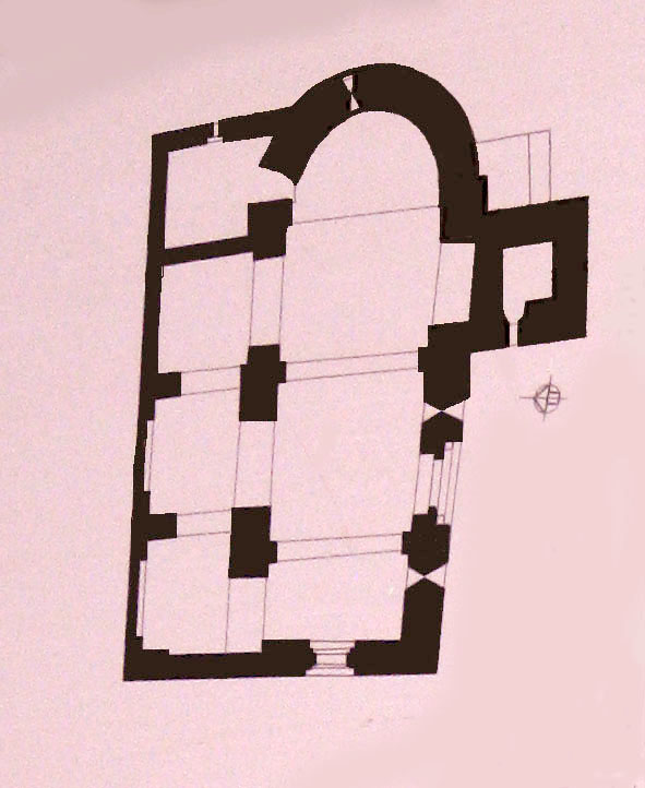 Planta de la iglesia de Santa María de All en la Baja Cerdaña (Cataluña ) España